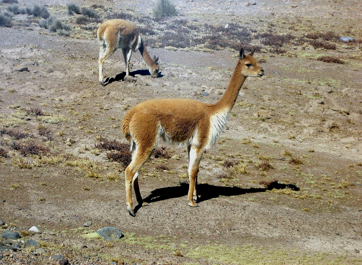 Vigognes dans la Réserve nationale de Salinas y Aguada Blanca, Pérou.